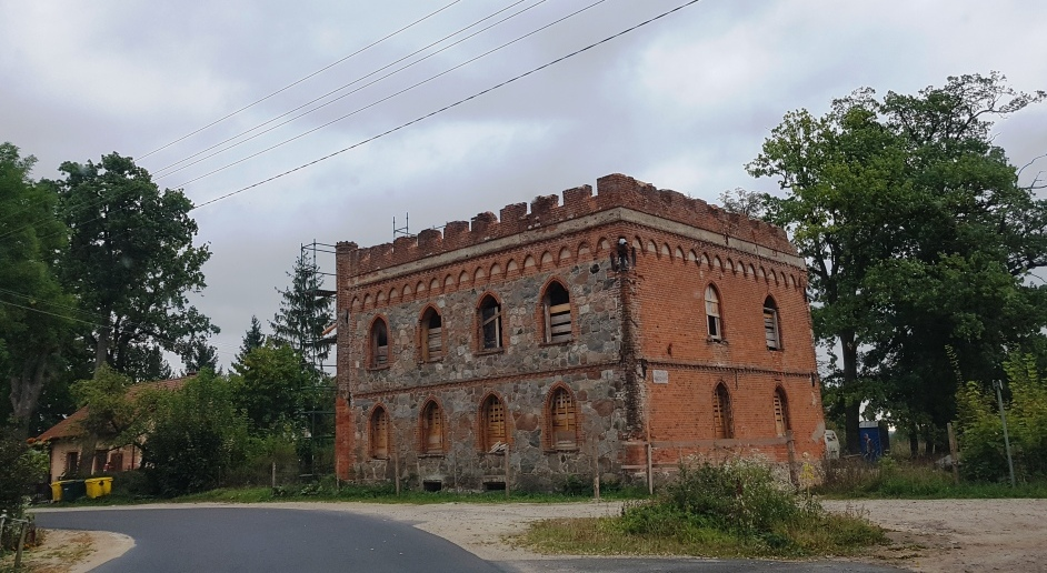 Stega Mała - pozostałości założenia dworsko-folwarcznego, początek remontu, rok 2018